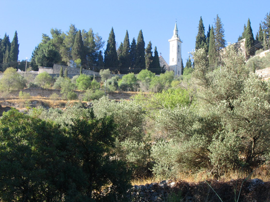 Ein-Kerem